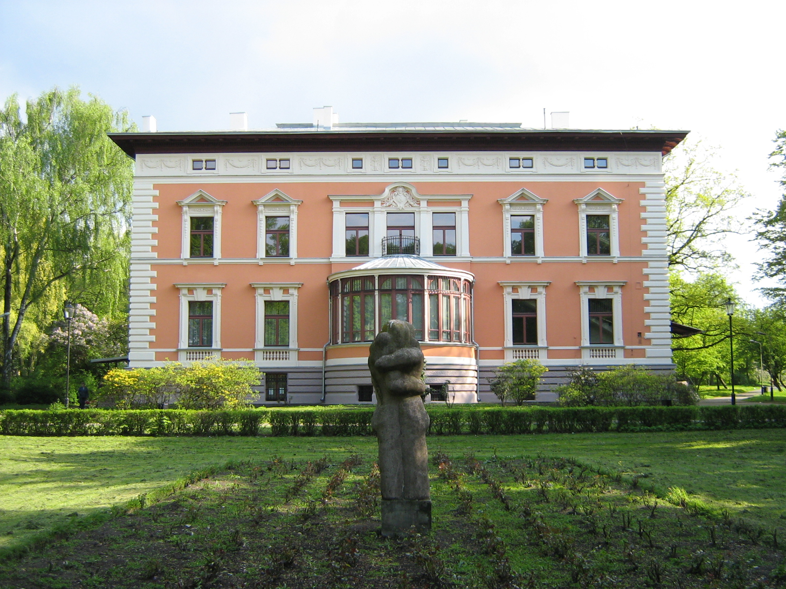 Willa Ernsta Leonhardta w Łodzi